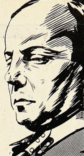 Pedro Prado Calvo (Santiago, 8 de octubre de 1886-Viña del Mar, 31 de enero de 1952) fue un escritor, pintor y arquitecto chileno, ganador del Premio Nacional de Literatura en 1949.